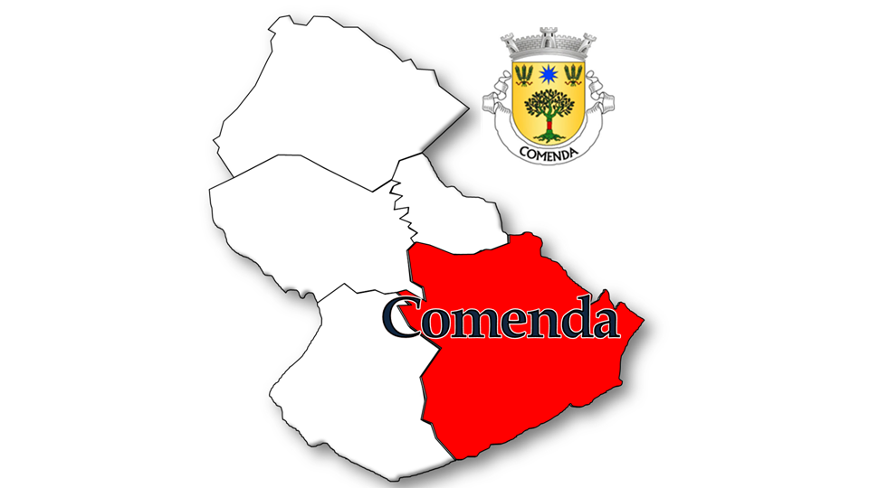 Evolução da População